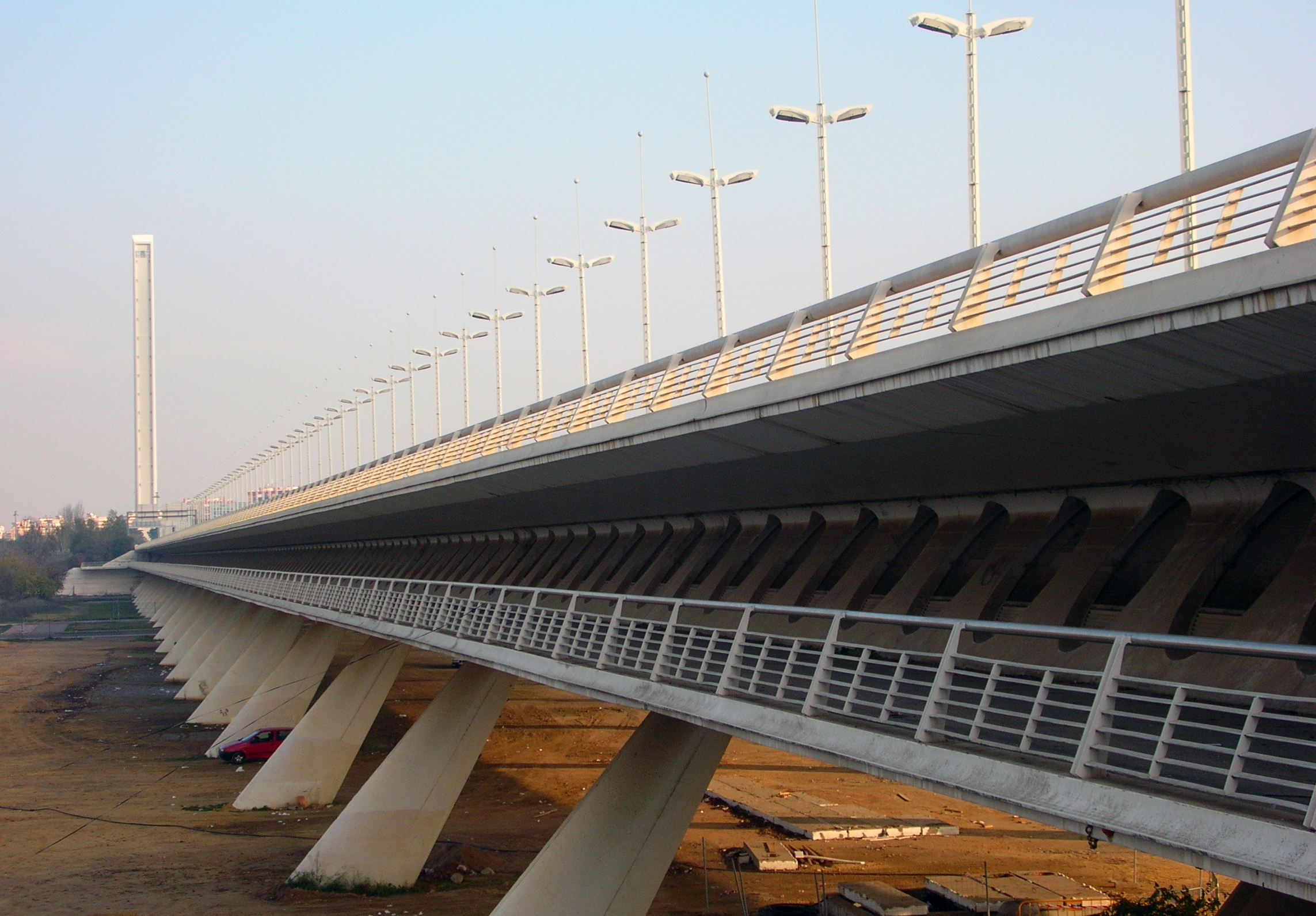 Viaduc de la Cartuja (Séville). Viaducto de la Cartuja (Sevilla).